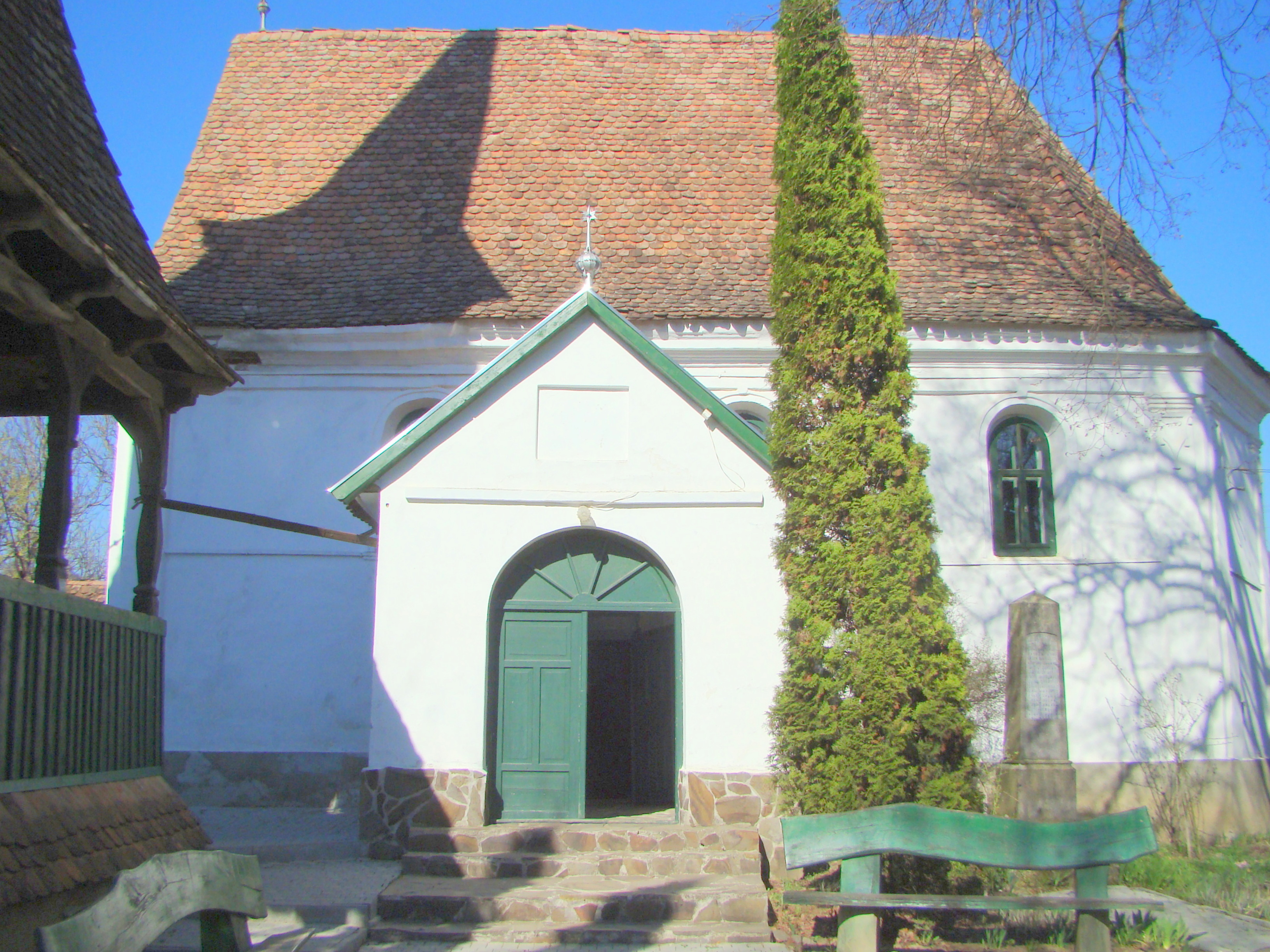 Biserica reformată, sat Rigmani; comuna Neaua 01